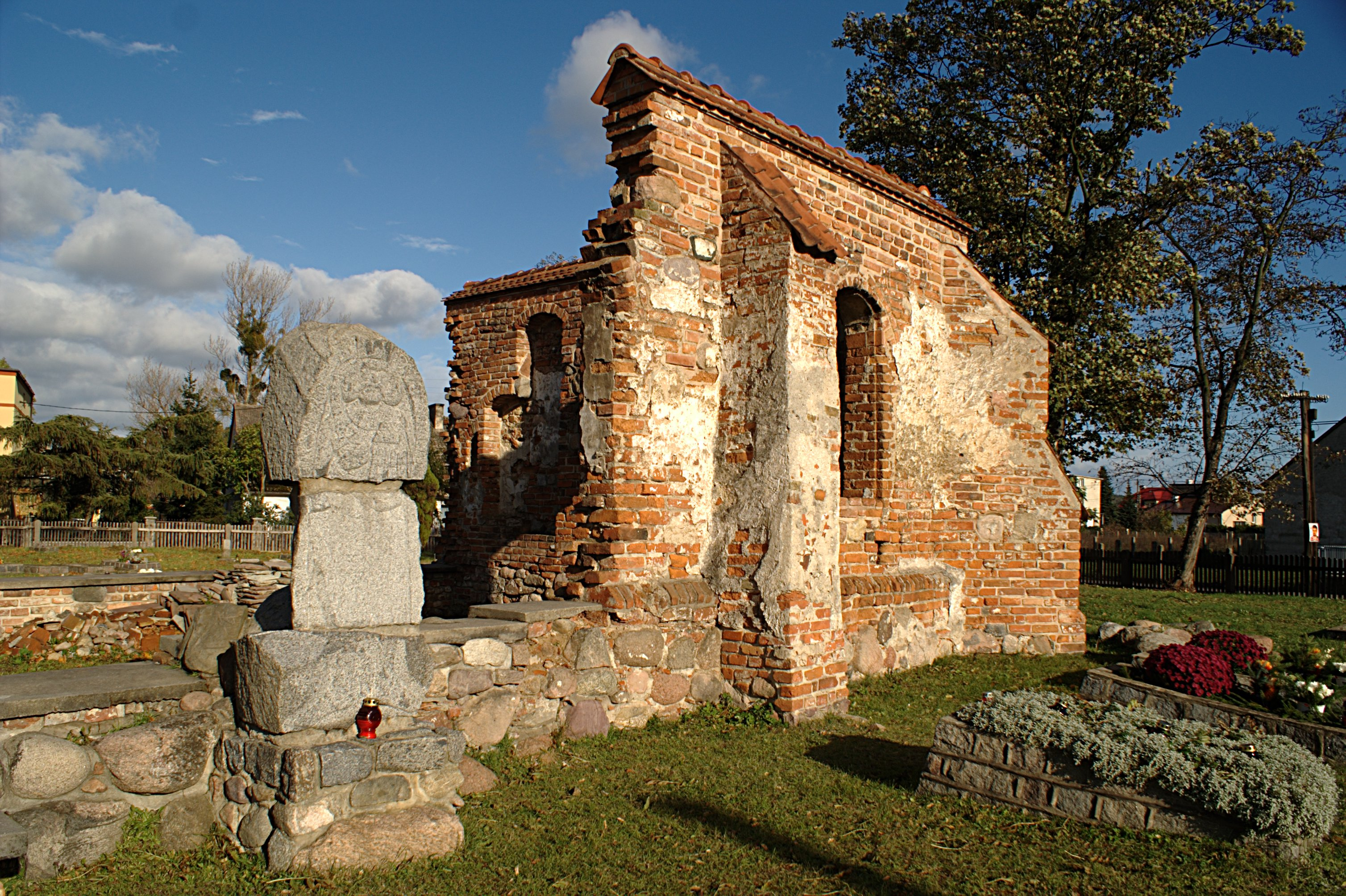 Ruiny kościoła Świętego Krzyża w Rumi.